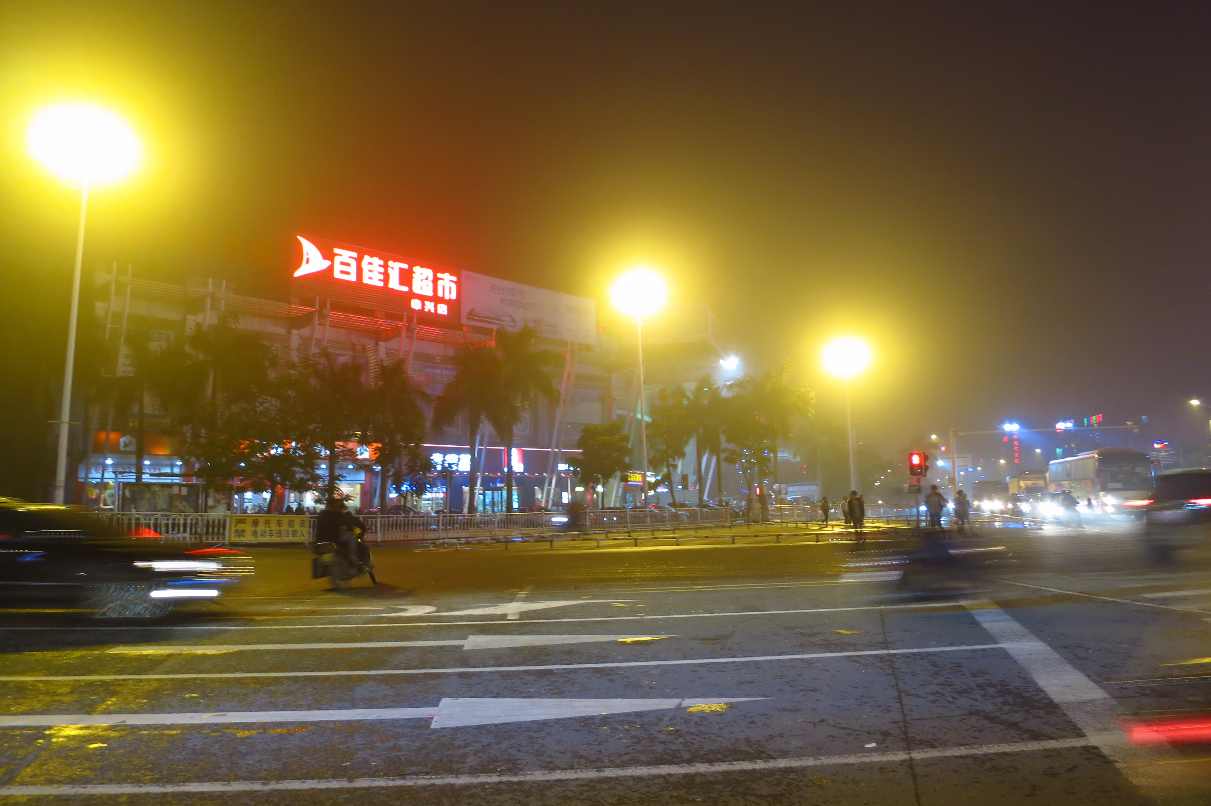 巡道工出品 photo by Xundaogong